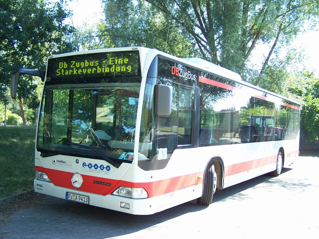 RAB Wagen 9413 in Ravensburg am Sonnenbüchel.